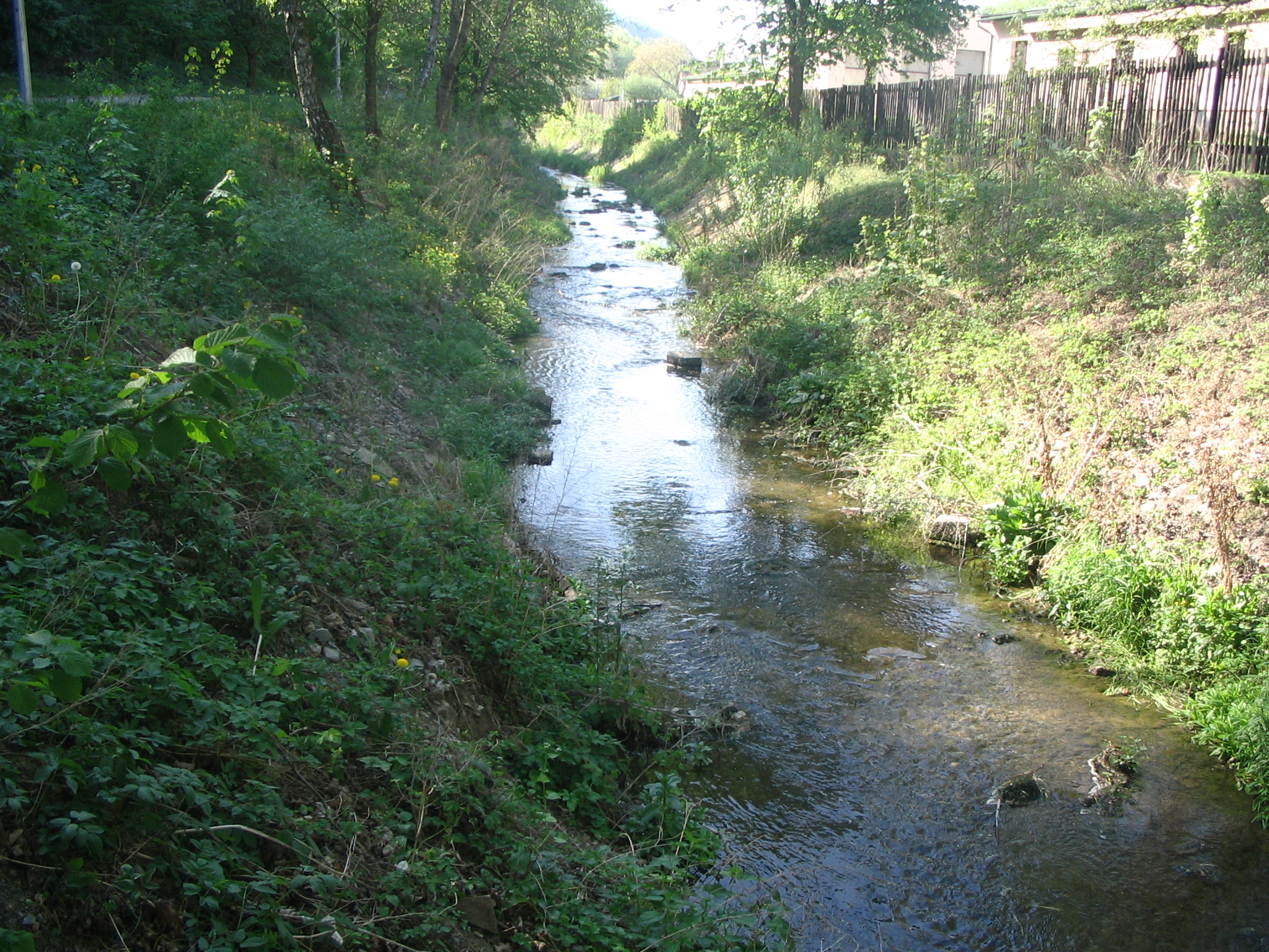 Radotínský potok u pěší stezky v Radotíně